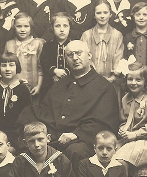 Josef Zilliken, Priester des Bistums Trier, NS-Opfer, umgekommen im KZ Dachau, 1942